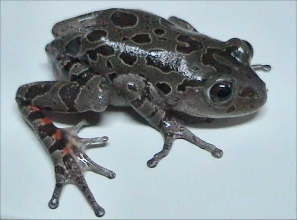 Kassina maculuata